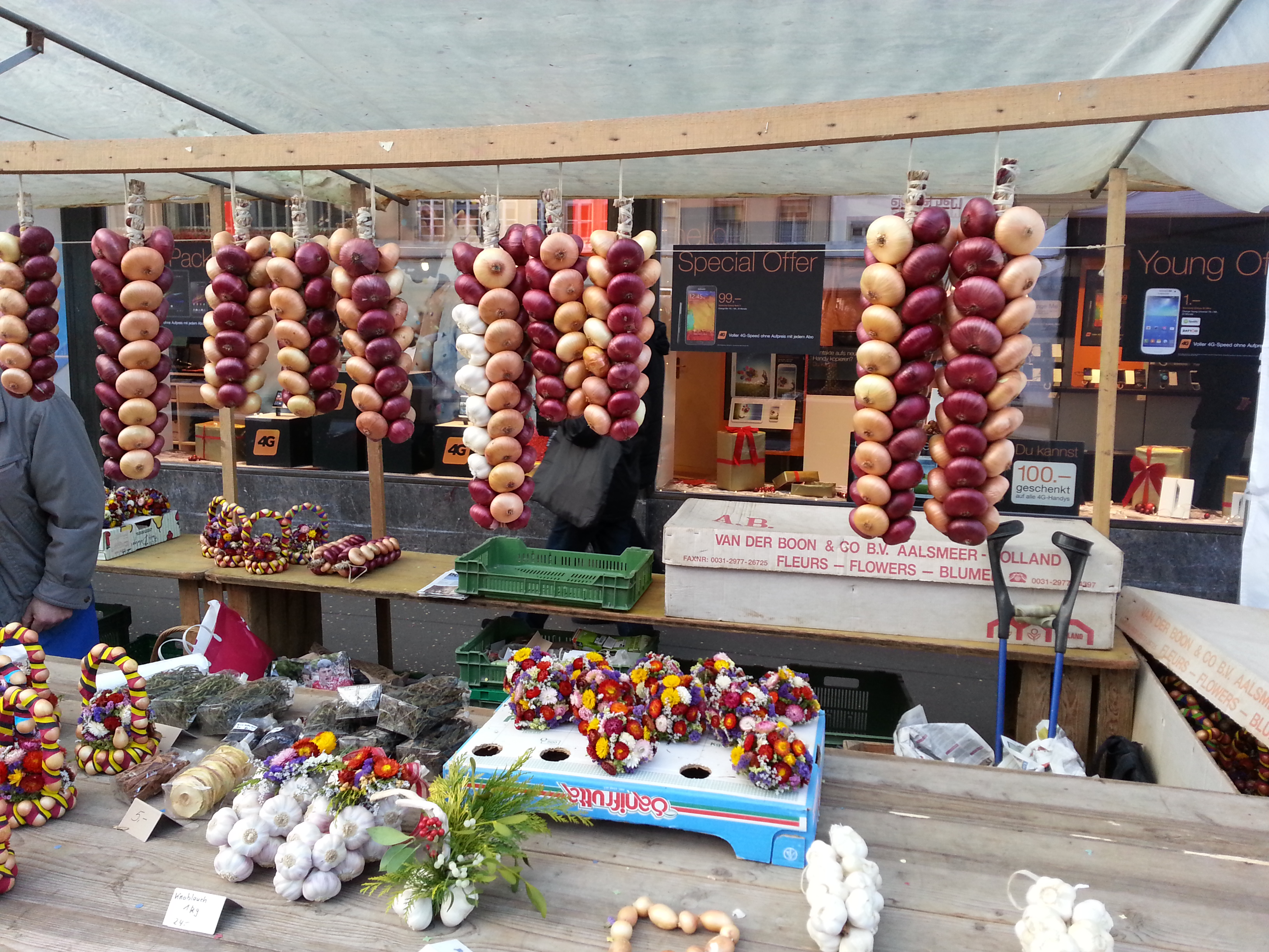 Onions Market Berne, Switzerland